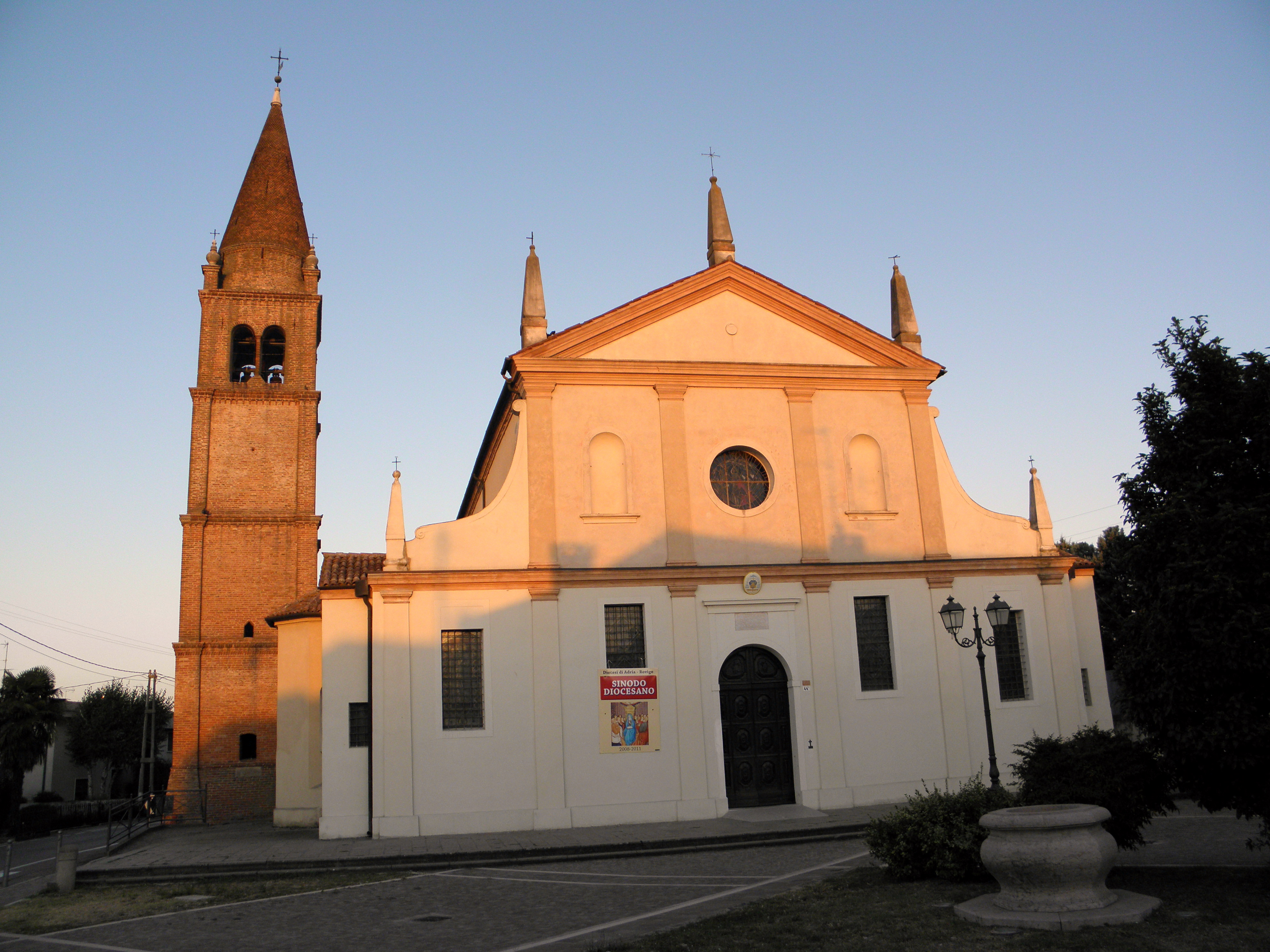 San Bellino: la chiesa parrocchiale ed arcipretale di San Bellino, vescovo e martire.